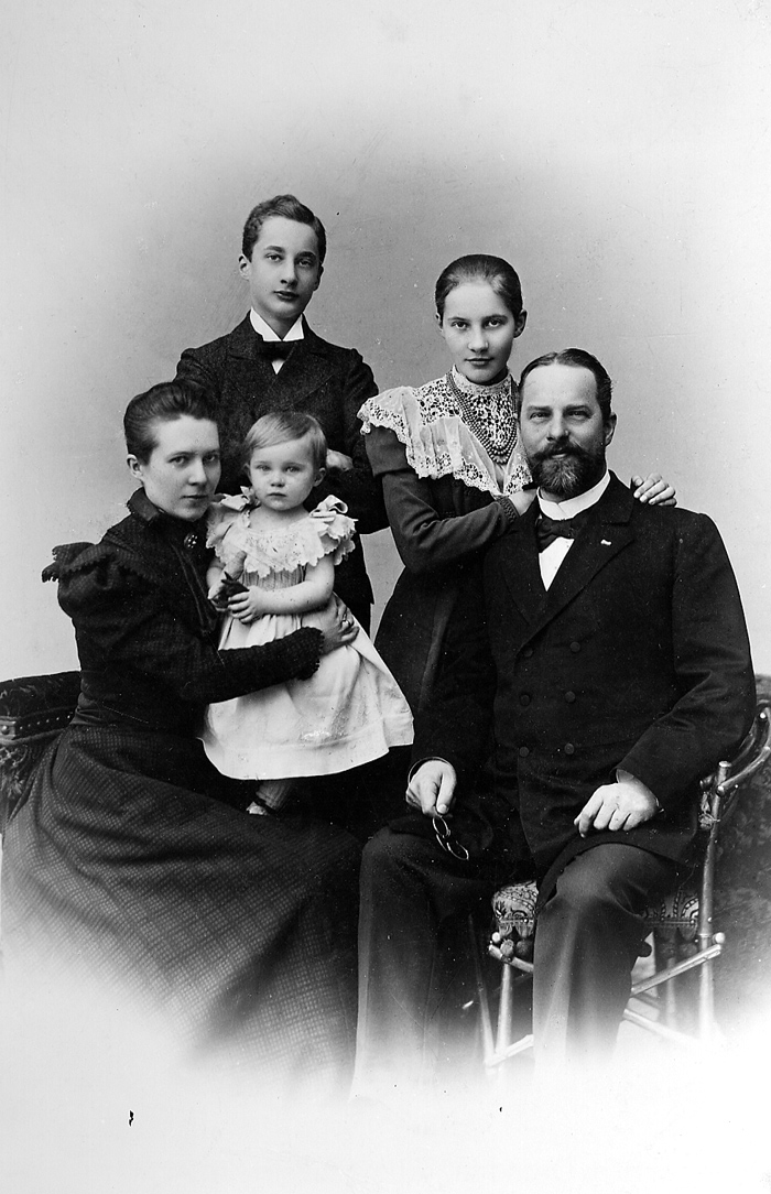 Friedrich Karl David Bouché mit seiner Familie. Vermutlich ist die Benennung "Friedrich Karl David Bouché" durch die SLUB/DF ein Irrtum, zumal die zugehörige Karteikarte nur den Nachnamen nennt. Wahrscheinlich handelt es sich richtig um Johann Carl Friedrich Bouché (1850-1933), der in Dresden tätig war.